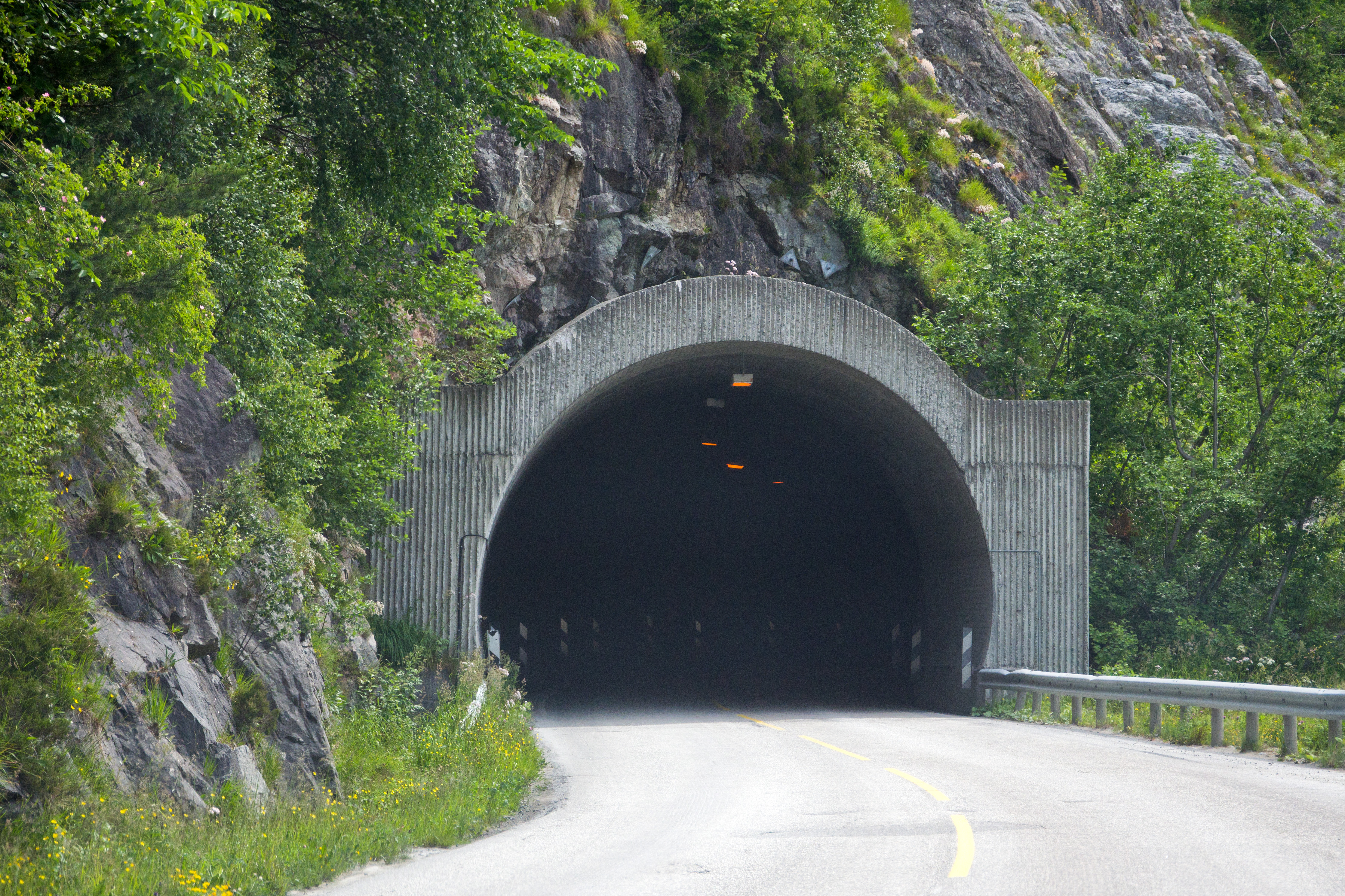 Trettøytunnelen på Riksvei 70 i Sunndal kommune, Møre og Romsdal. Nordre innslag.